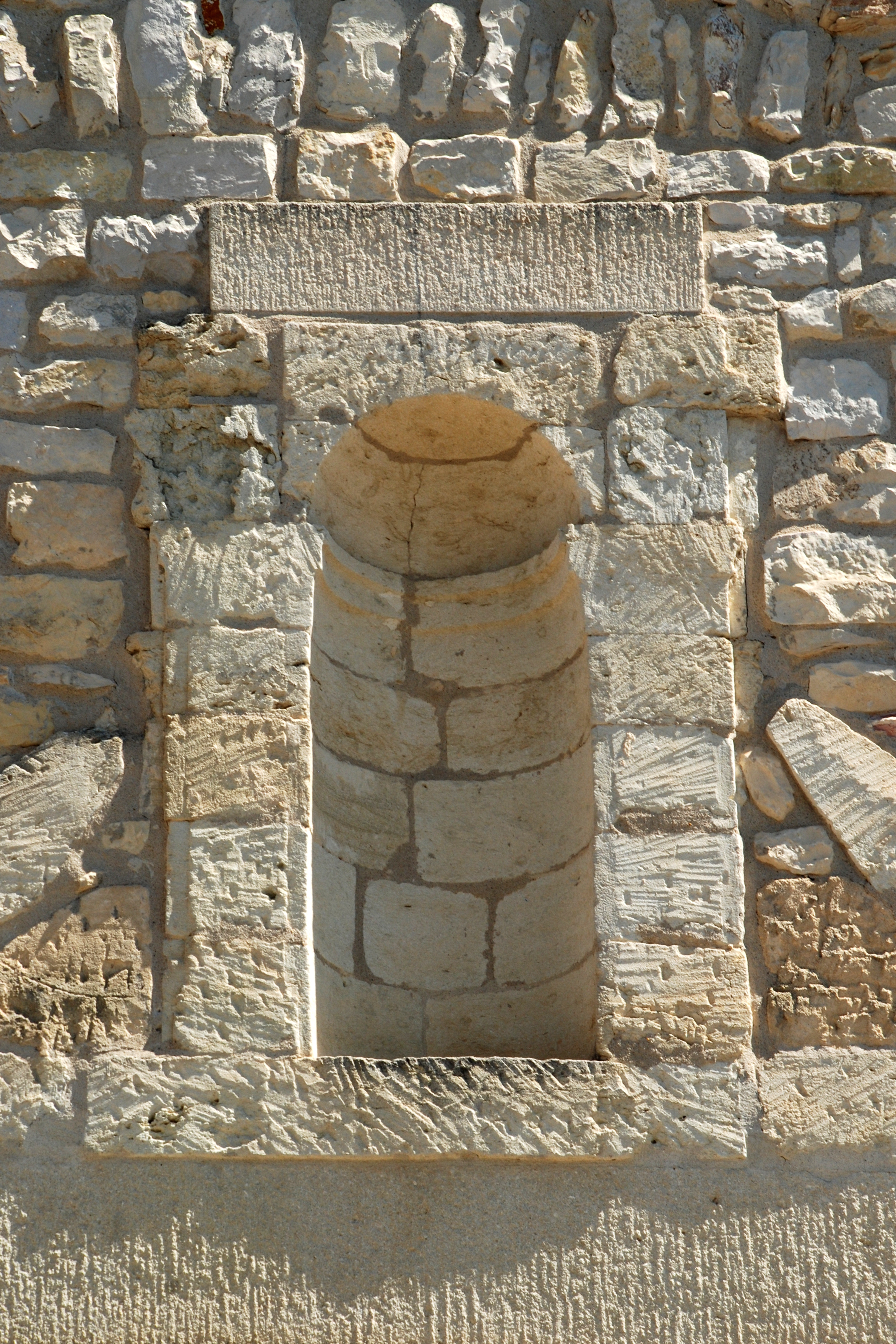 France - Gard - Église Notre-Dame et Saint-André de Congénies